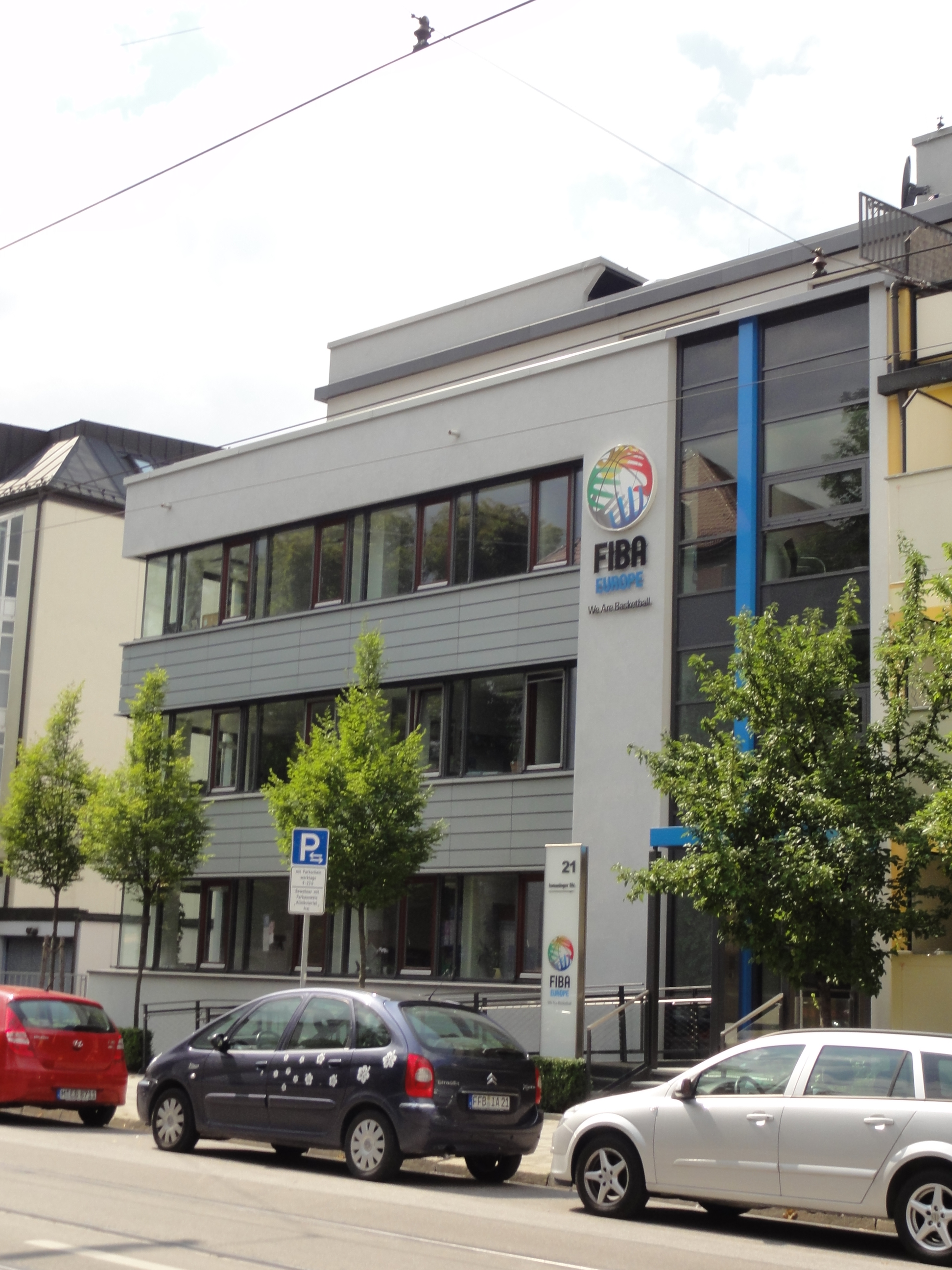 Munich, Ismaninger Str.